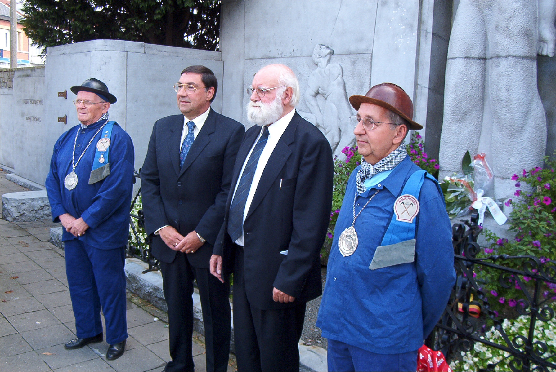 Grâce-Berleur, burgemeester Maurice Mottard en mijnwerkers benoemen Jef Ulburghs tot ereburger